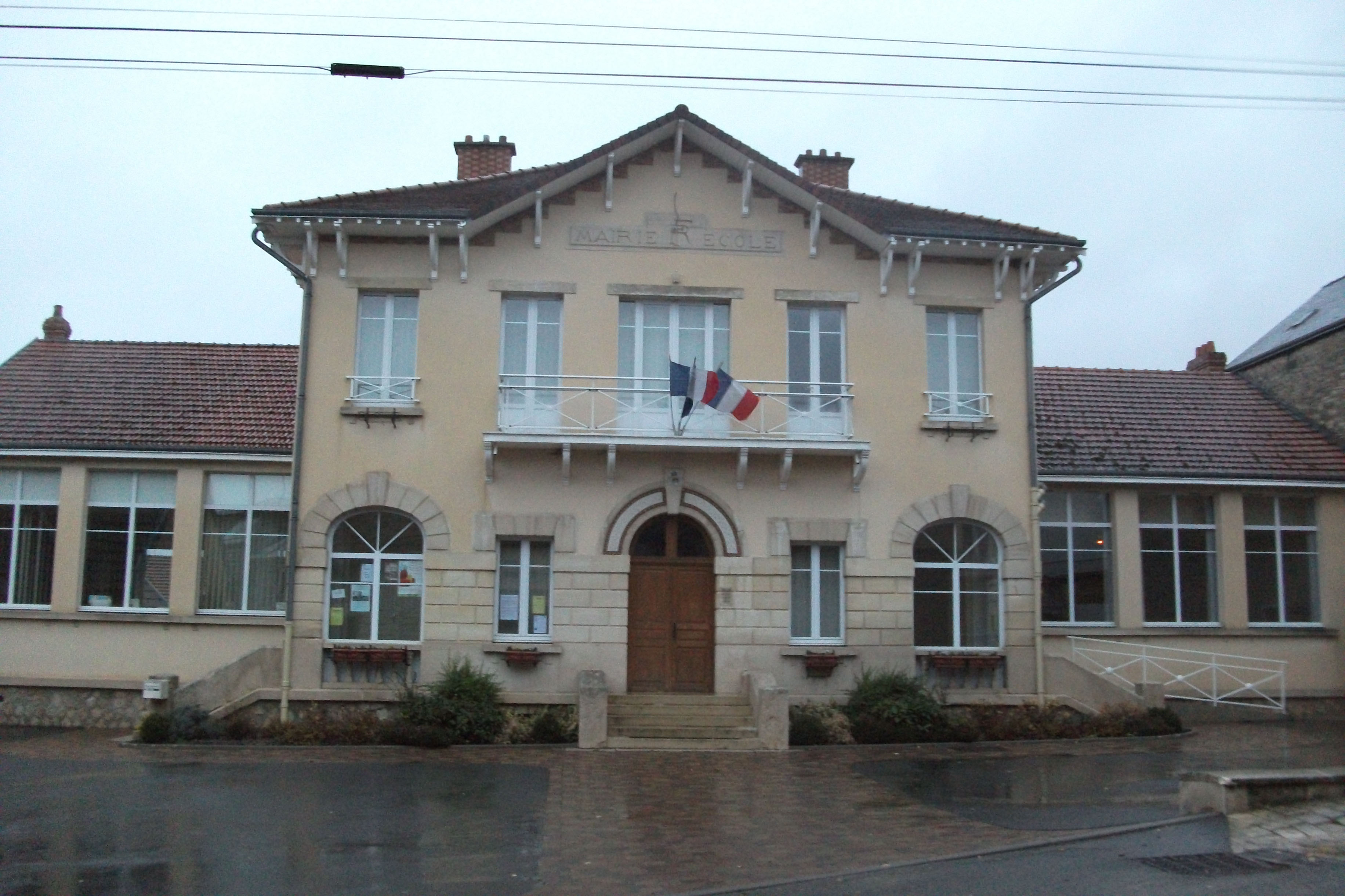 Serzy_et_Prin_: la mairie.